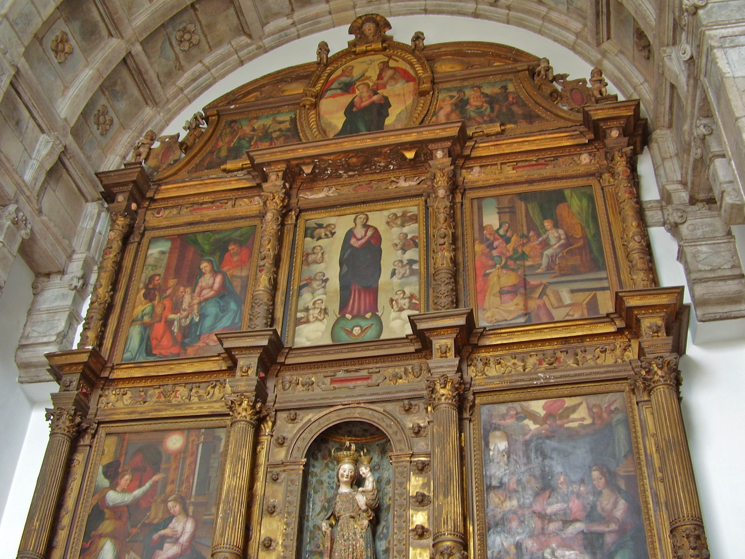 Capela de Nossa Senhora de Agosto This file was uploaded for Wiki Loves Monuments in Portugal with the unique identifier 70200.